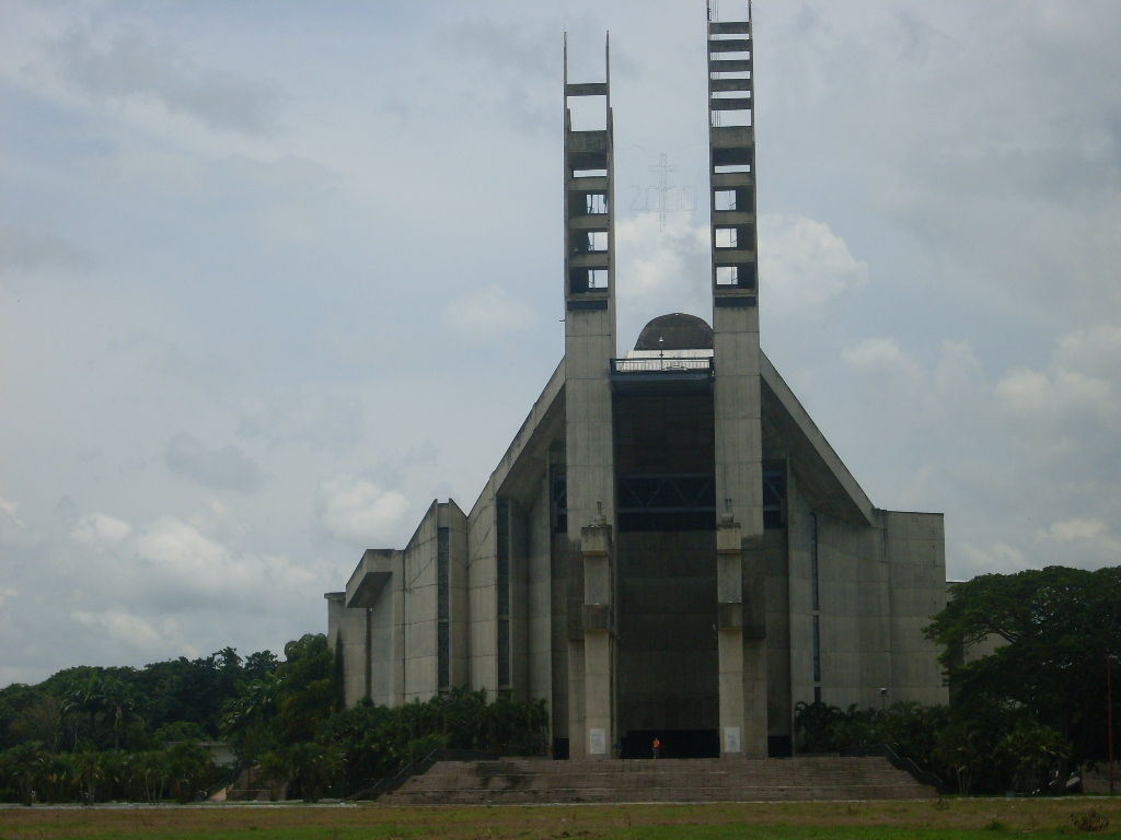 Templo Votivo de la Virgen de Coromoto, estado Portuguesa - Venezuela